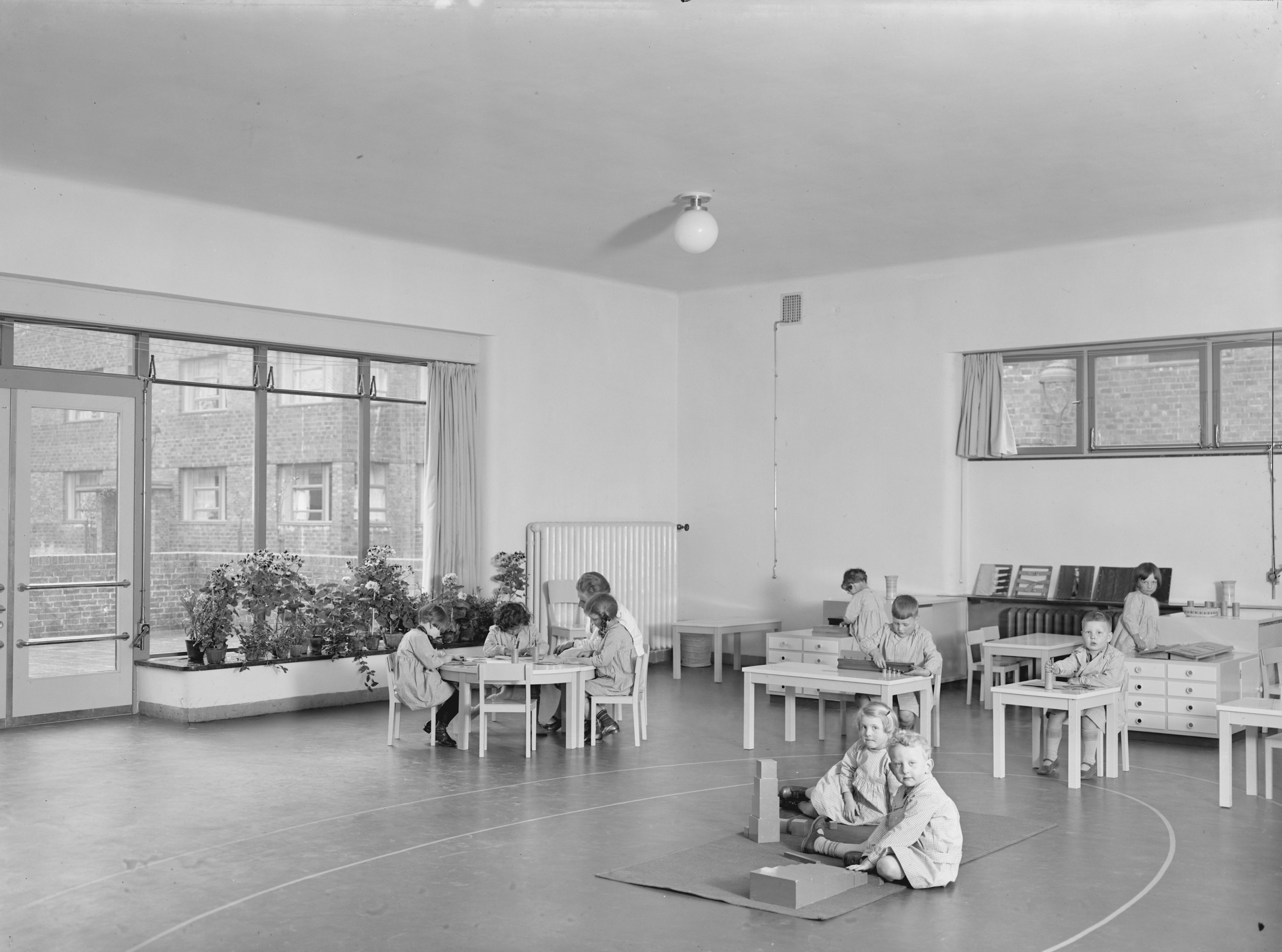 Montessorischule Nr. 10 [Innenansicht] = Montessori-Kinderhaus